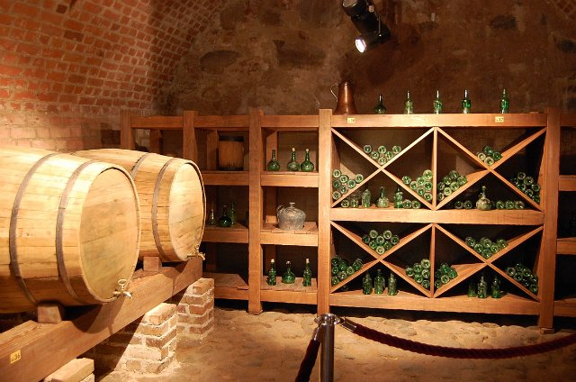 Мірскі замак. Вінны скляпок